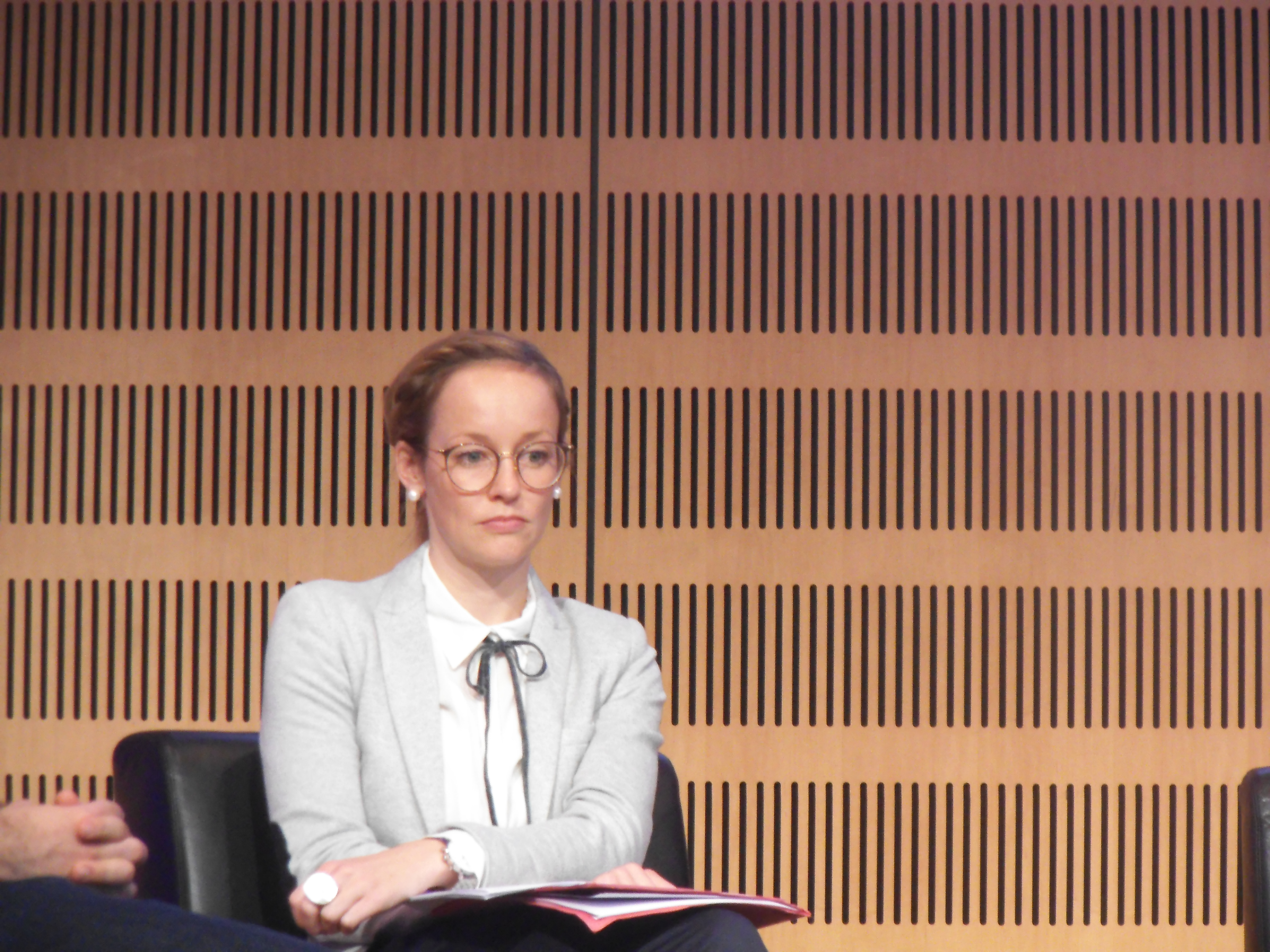 Louisa Specht-Riemenschneider, Professorin an der Friedrich-Wilhelms-Universität Bonn, beim Symposium "Zugang gestalten" der Deutschen Nationalbibliothek in Frankfurt am Main am 1. November 2019.